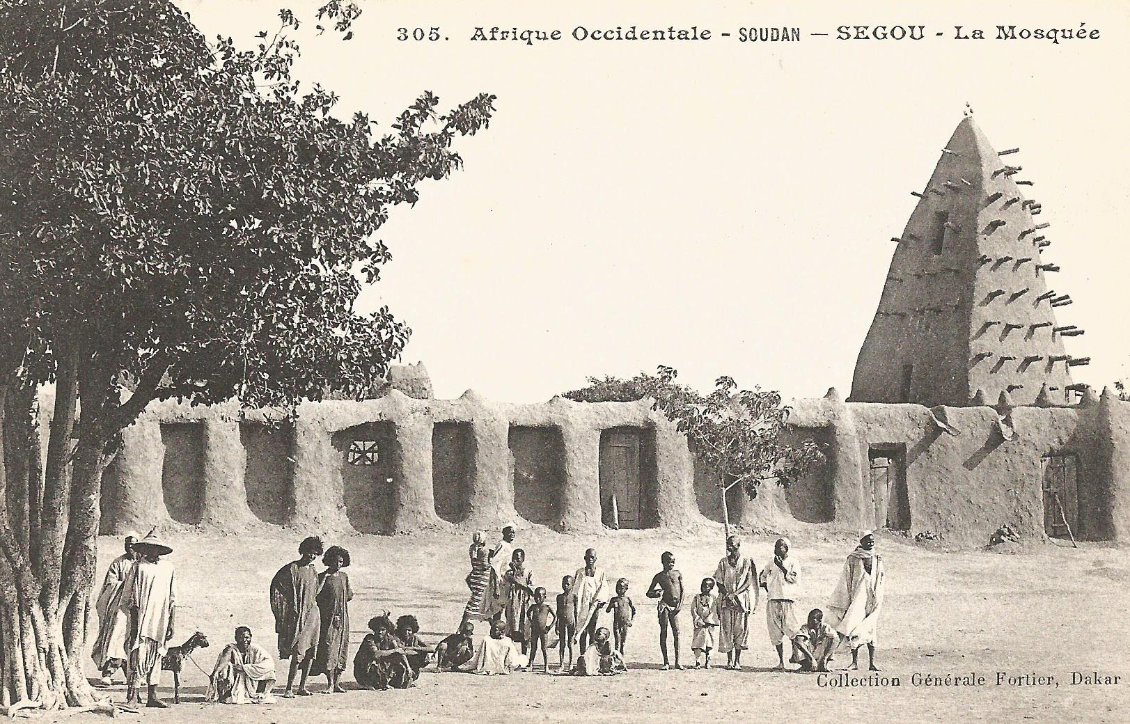 François-Edmond Fortier, Segou. La Mosquée. Afrique Occidentale - Soudan.